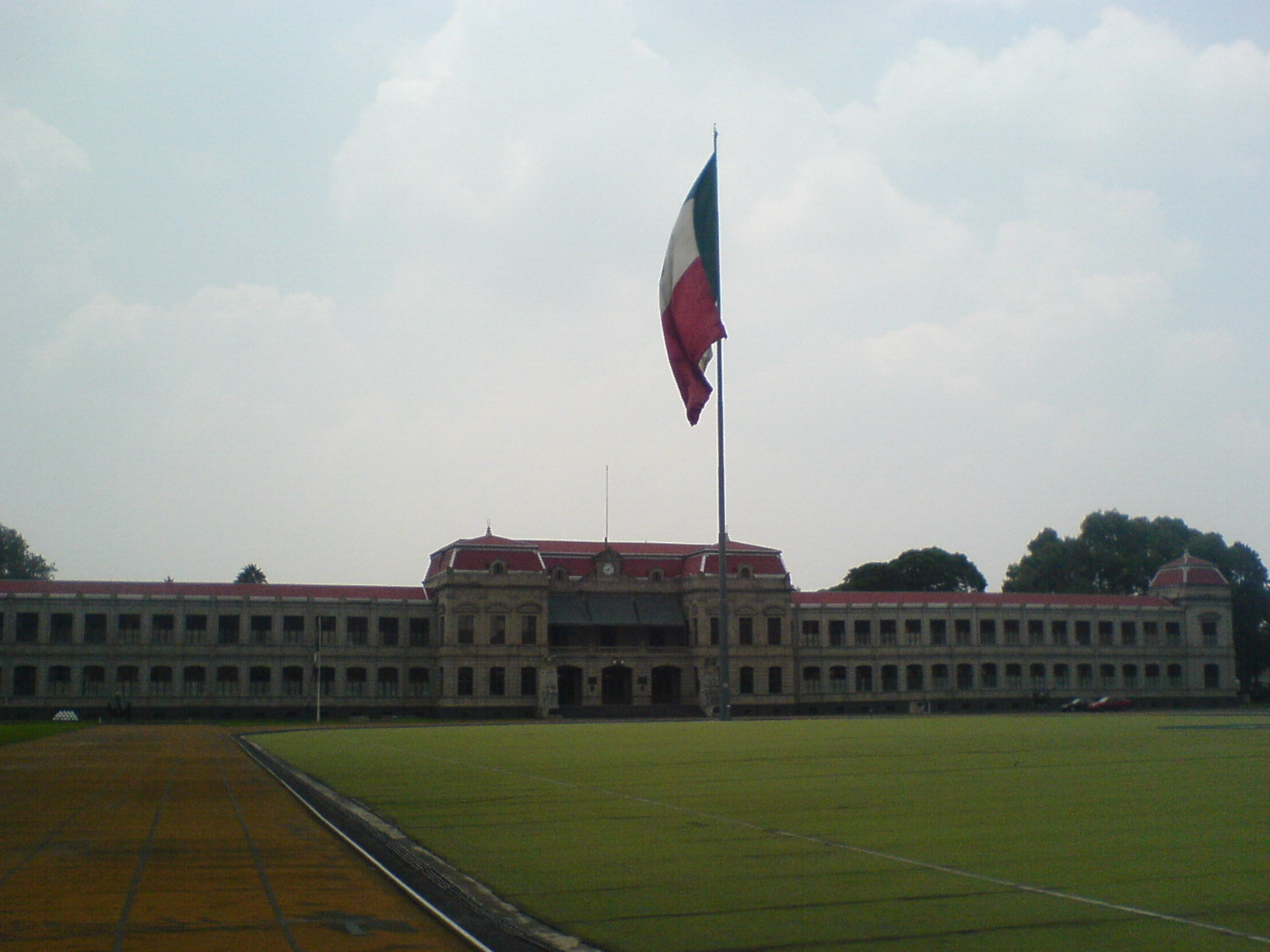 Frente del edificio de la Escuela militar de Ingenieros y de la UDEFA